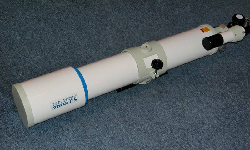 teleskop - apochromat fluorytowy